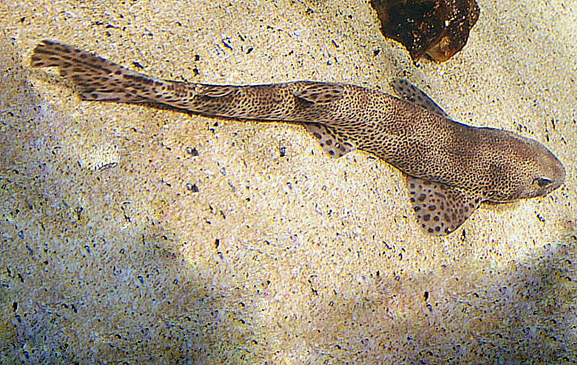 Een hondshaai in het Nationaal Visserijmuseum te Oostduinkerke (België)